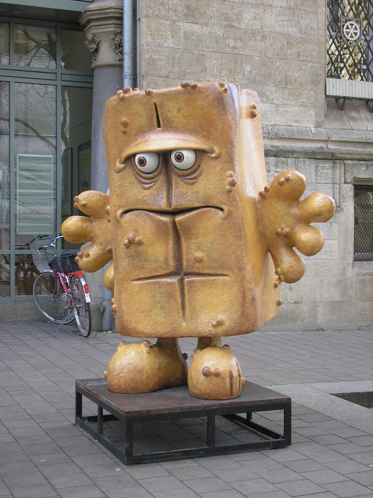 Das Bernd-das-Brot-Denkmal auf dem Fischmarkt in Erfurt (Thüringen).